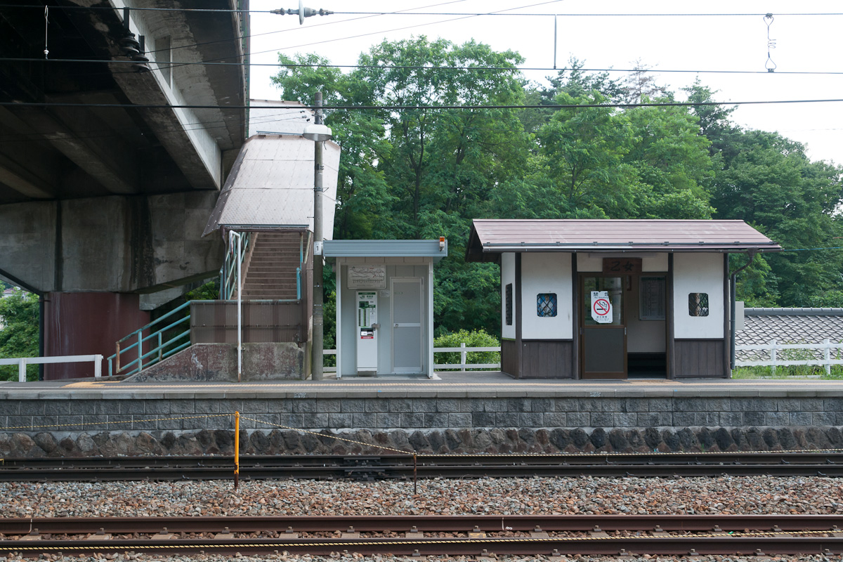 JR東日本小海線乙女駅。手前の線路はしなの鉄道（旧信越本線）